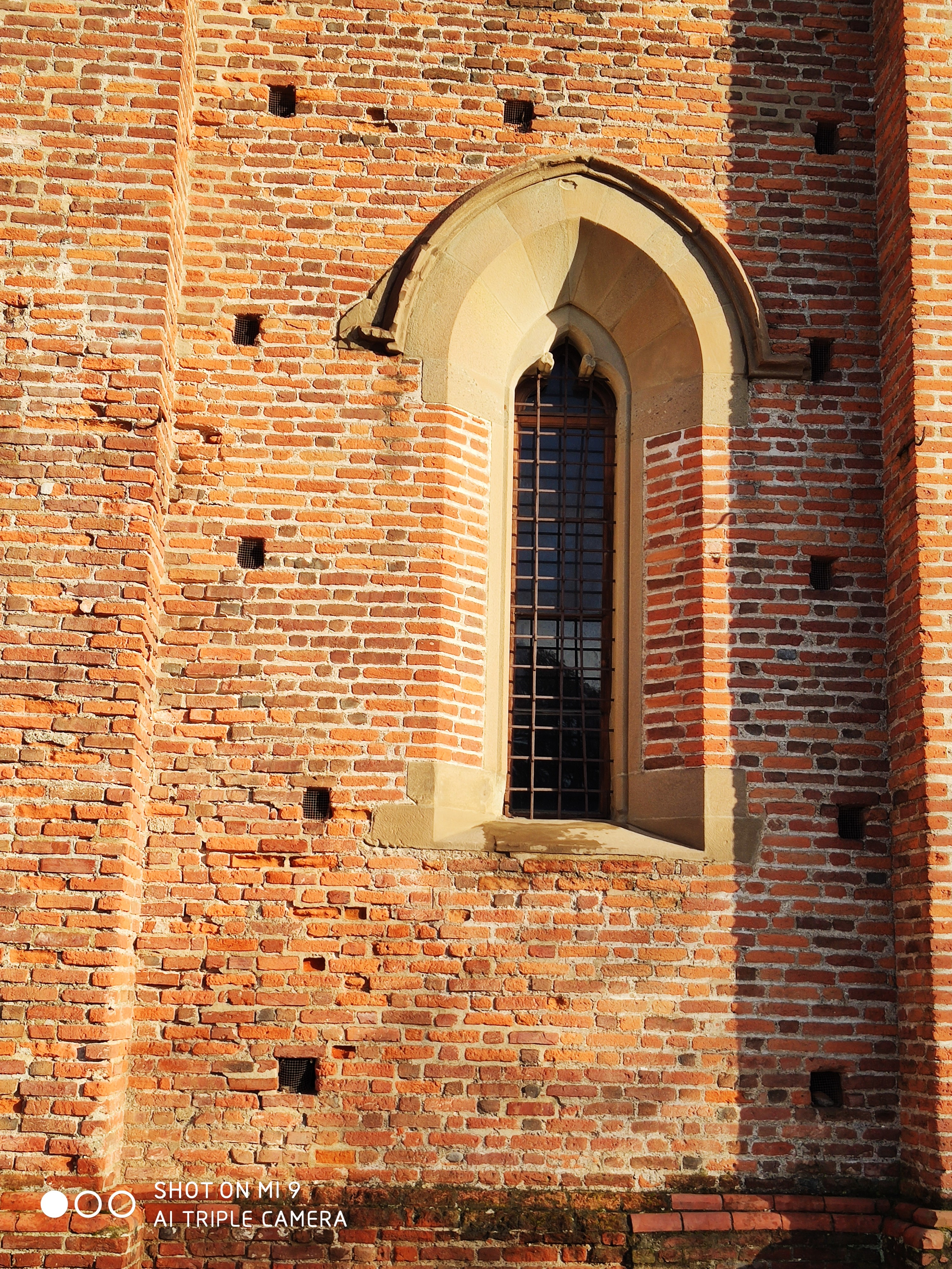 Monofora in mattoni con contorno in pietra molera della Facciata della collegiata di Castiglione Olona (Varese)